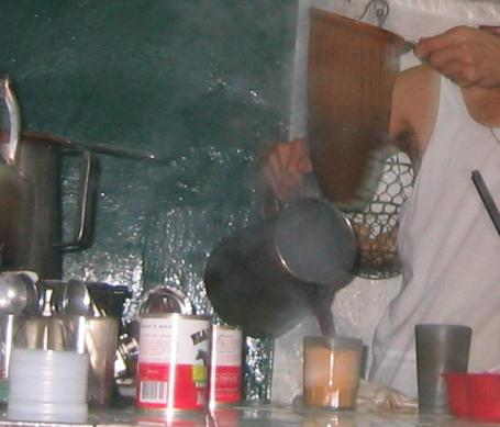 Making Hong Kong-style milk tea